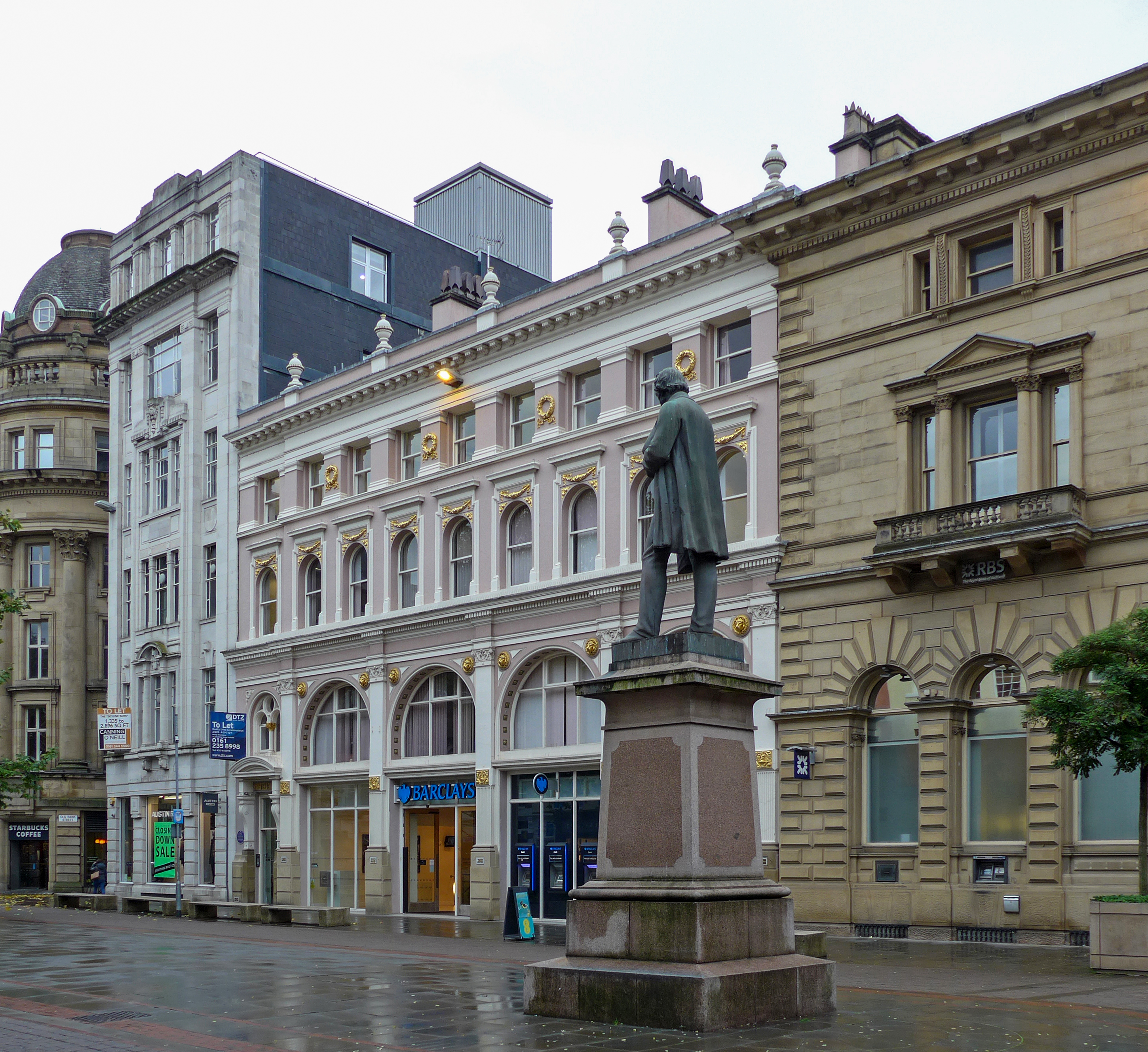 St Ann's Square, Manchester